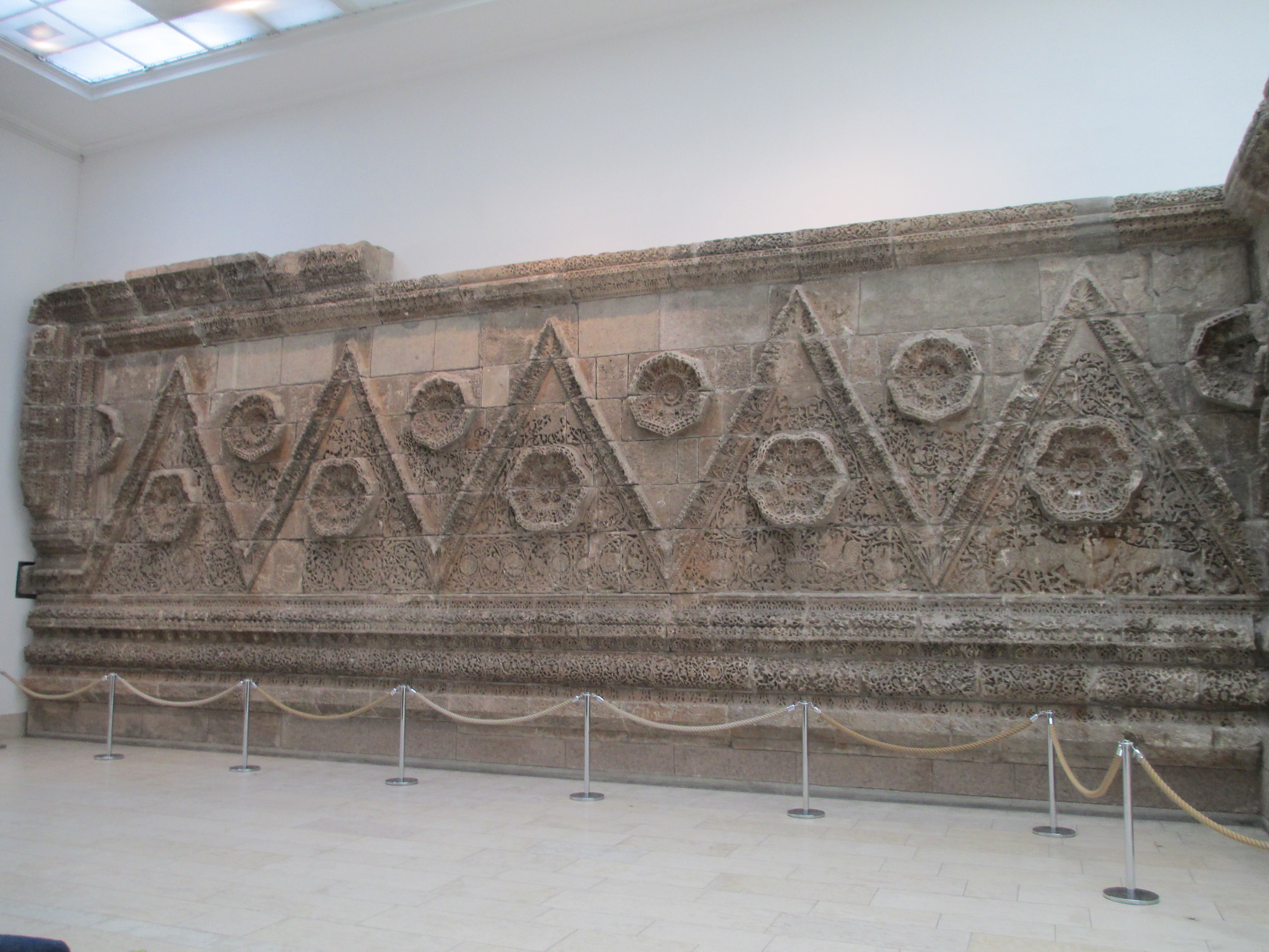 חזית ארמון משטה במוזיאון פרגמון